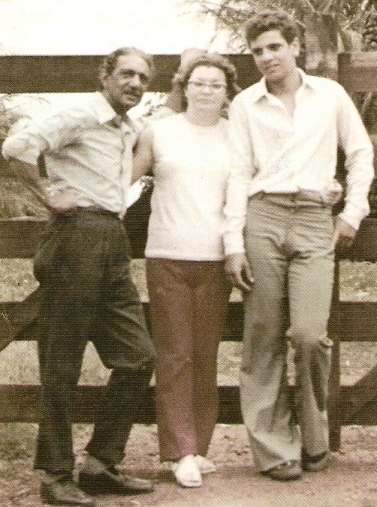 João; Deda e Tuca